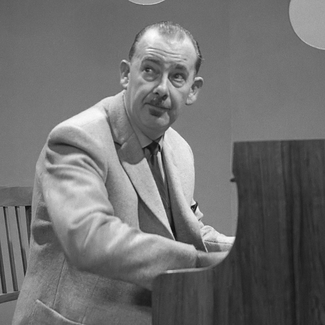 Fred Rombouts presenteert "Musicbox" voor KRO, Melle Weersma aan de vleugel 1 februari 1961